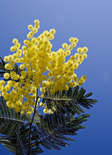 Mimosa en février sur l'île de Ré